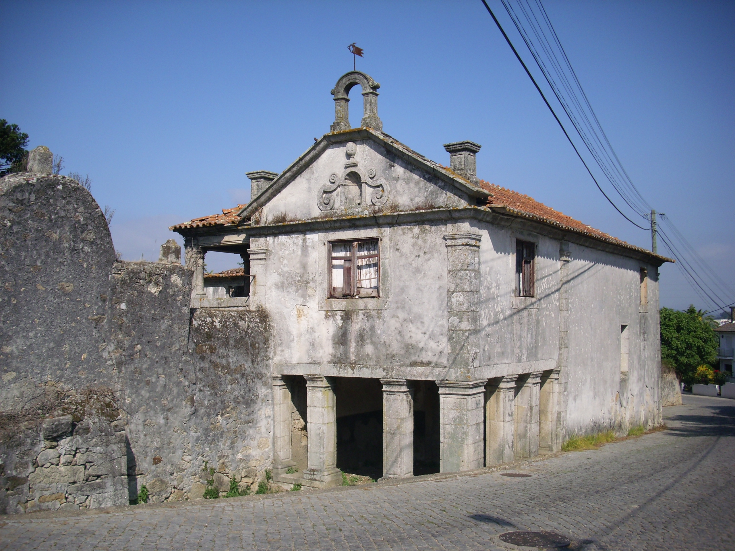 Quinta de Baixo / Quinta dos Condes de Paço Vitorino. Portugal, Porto, Vila Nova de Gaia, Vilar de Andorinho, Gaveto da Rua de Mariz com a Rua de São João Baptista. This monument is classified as Sem protecção legal.